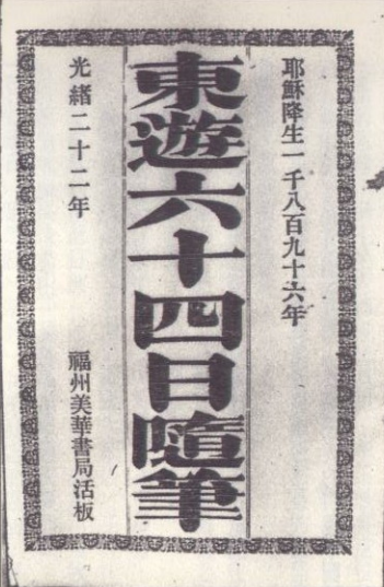 中文（台灣）: 東遊六十四日隨筆